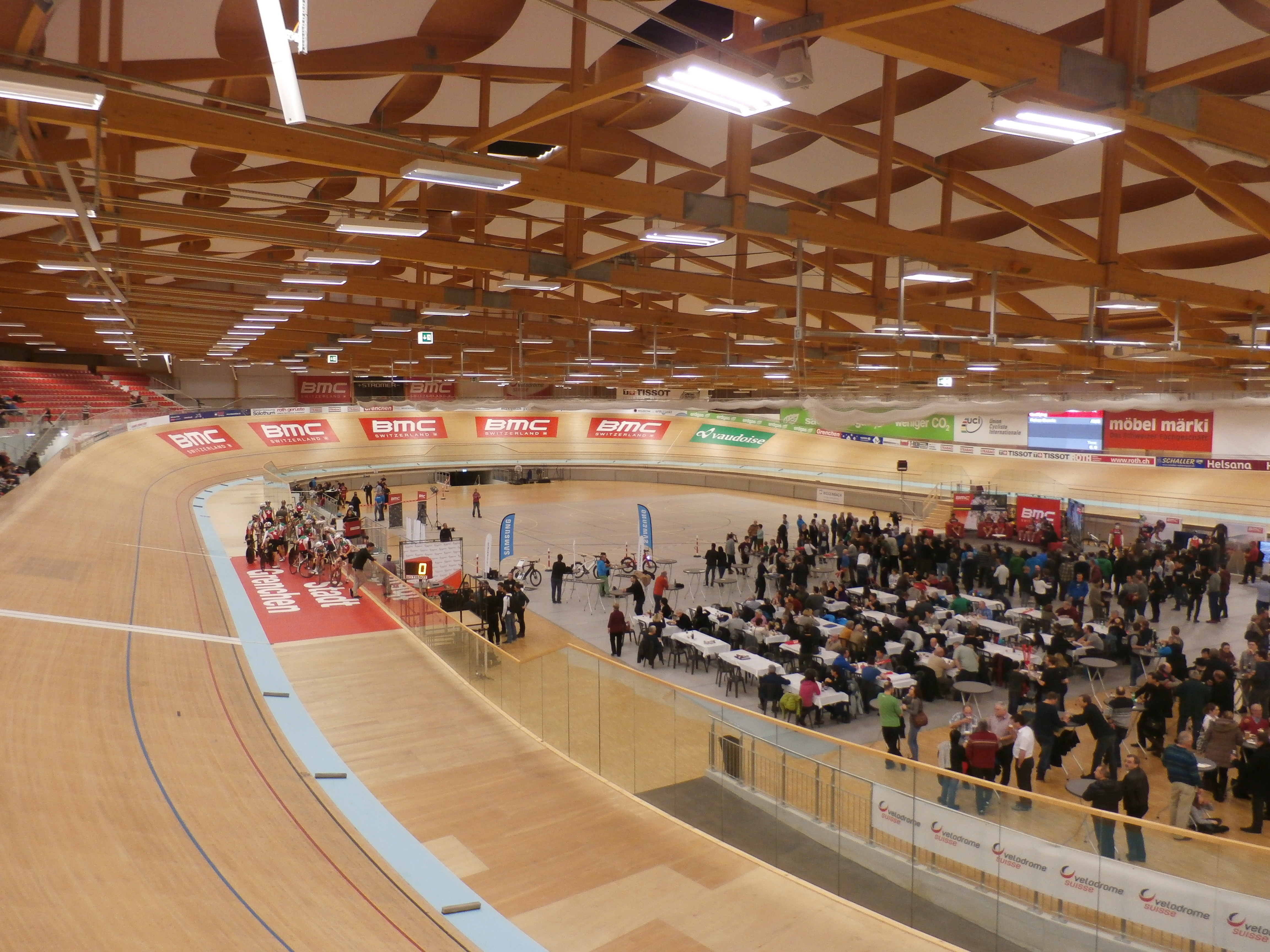 Vue intérieure du vélodrome suisse.